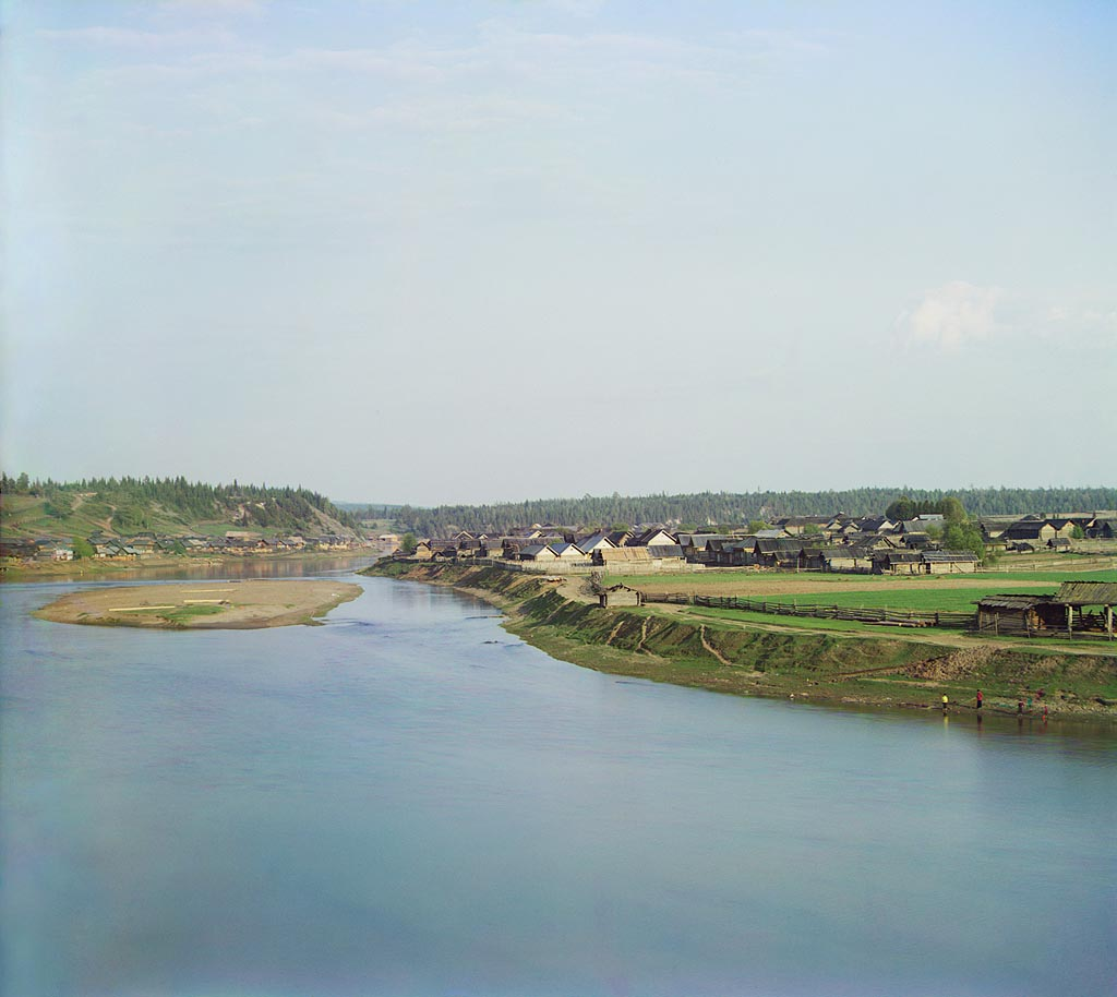 С. М. Прокудин-Горский. Общий вид на деревню "Мартьянову" с перешейка у камня "Переволочный". 1912 год